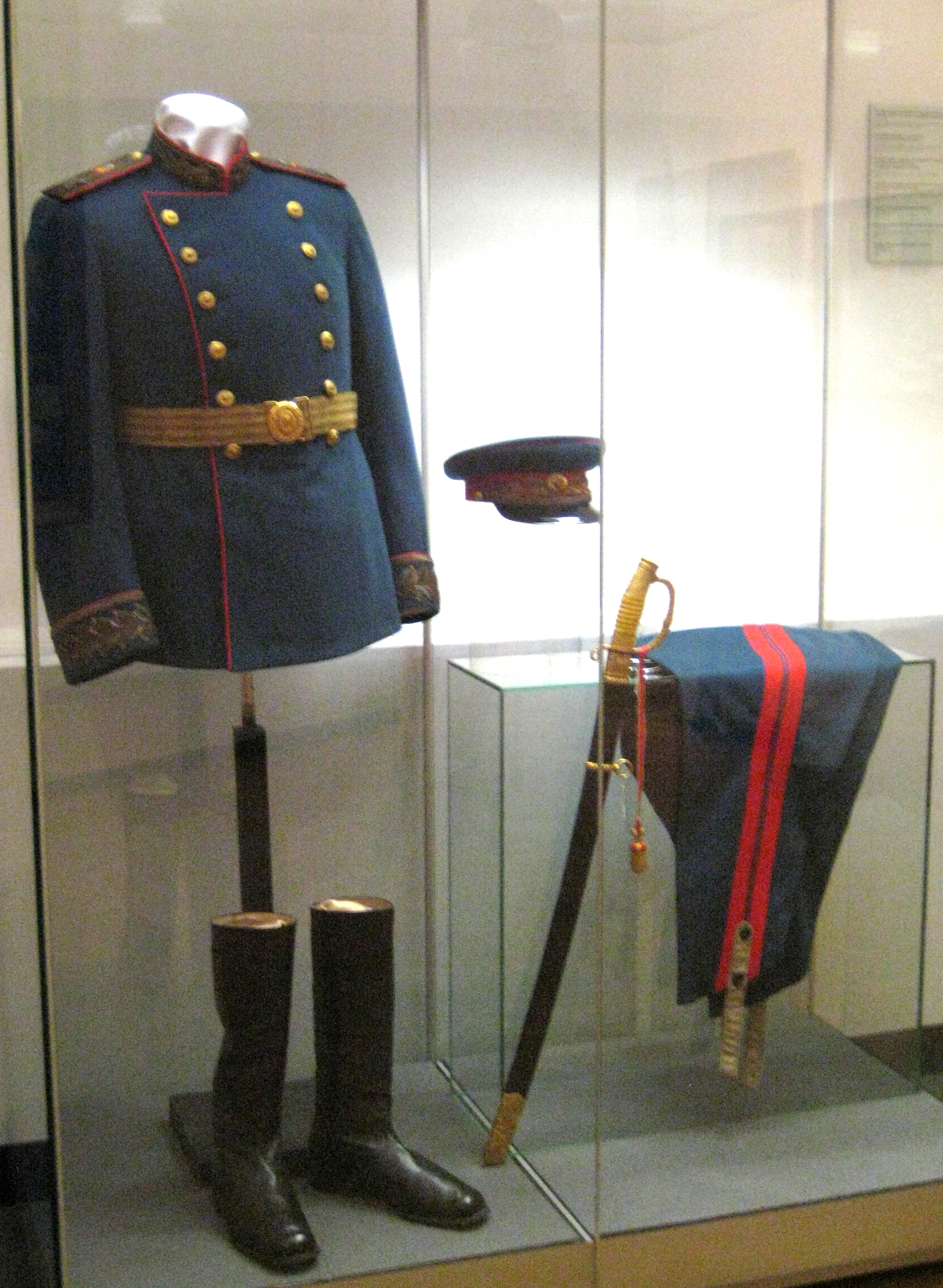 1. Мундир парадный маршала Советского Союза образца 1945 г. Из личных вещей И.В. Сталина. СССР, 1945. ГИМ 2. Пояс маршала Советского Союза. Из личных вещей И.В. Сталина. СССР, 1945. ГИМ 3. Брюки в сапоги "бриджи" к парадному мундиру маршала Советского Союза. Из личных вещей И.В. Сталина. СССР, 1945. ГИМ 4. Фуражка к мундиру маршала Советского Союза. Из личных вещей И.В. Сталина. СССР, 1945. ГИМ 5. Сапоги. Из личных вещей И.В. Сталина. Начало 1950-х. ГИМ 6. Шашка в ножнах. Из личных вещей И.В. Сталина. 1945. ГИМ 7. Шпоры. Из личных вещей И.В. Сталина. ГИМ 1945